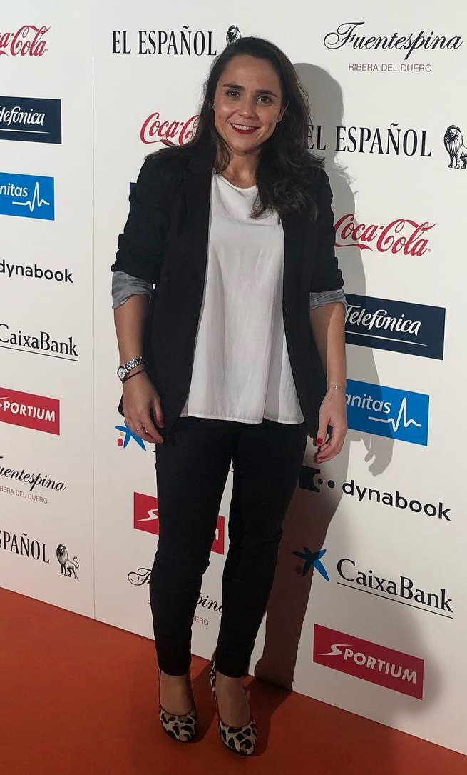 La exgimnasta española Paloma Moro en la Gala de los Premios Los Leones de El Español el 30 de octubre de 2019.